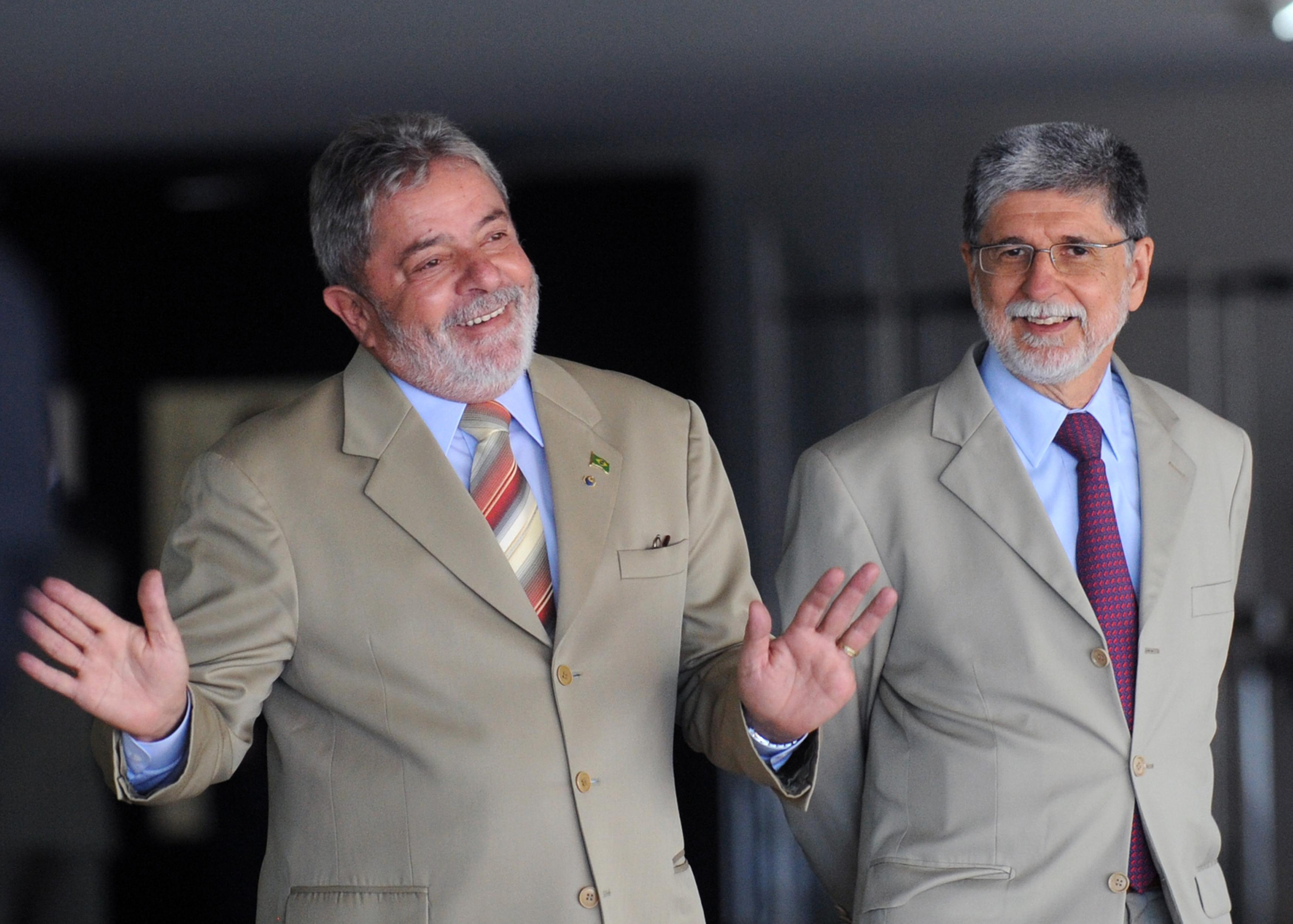 Brasília - O presidente Luiz Inácio Lula da Silva e o ministro das Relações Exteriores, Celso Amorim, conversam comn os jornalistas enquanto aguardam a chegada do presidente do Chile, Sebastián Piñera, ao Itamaraty (Antonio Cruz/ABr)